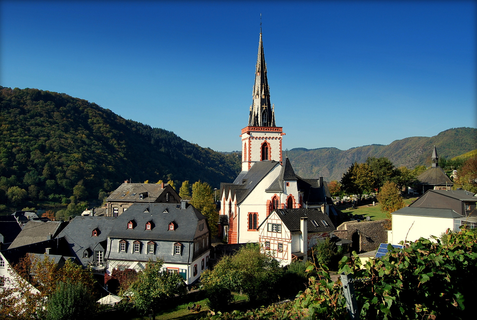 Parochiekerk Sankt Martin van Ediger